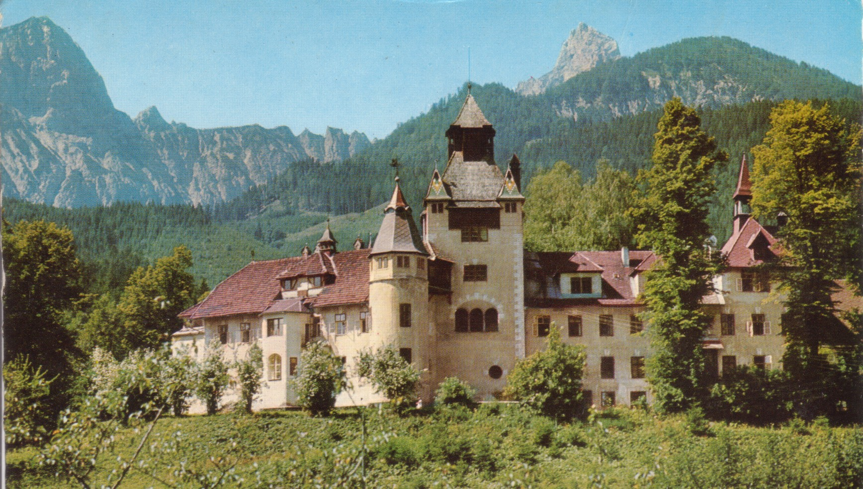 Schloss Kassegg um 1960